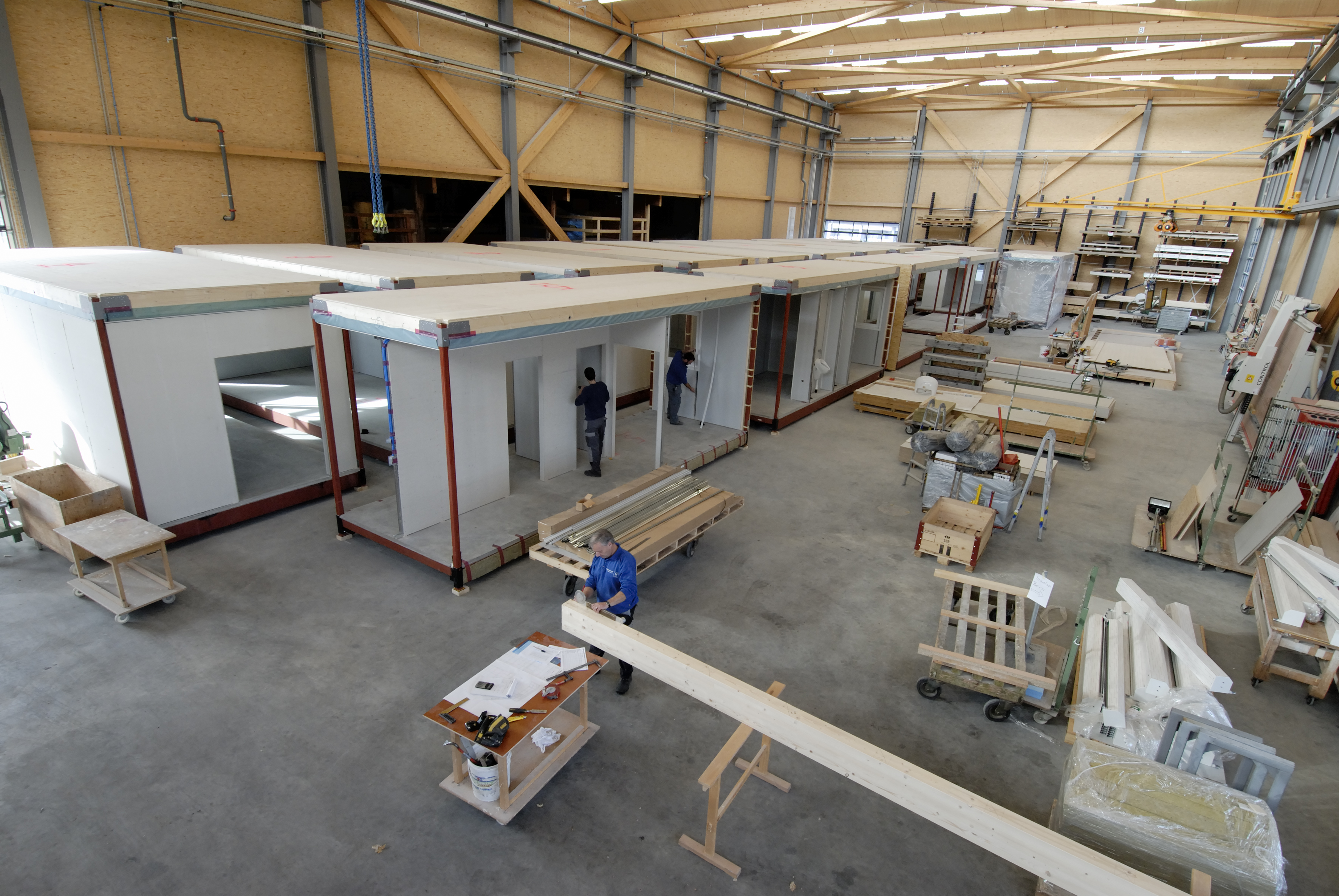 Die Herstellung von Hybrid-Modulen in einer Fertigungshalle.